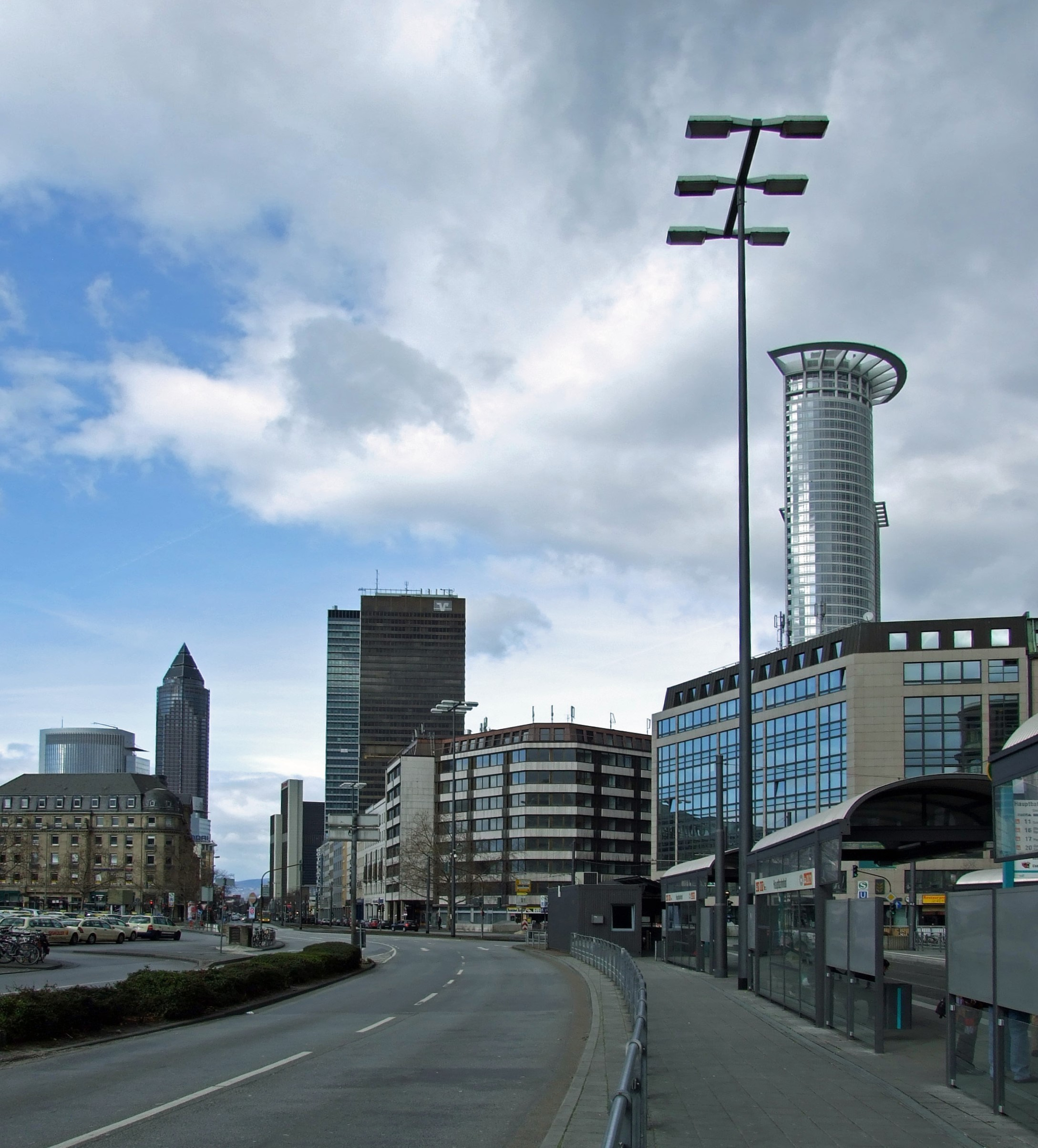 Alleenring am Hauptbahnhof in Ffm, Blickrichtung, Duesseldorfer Strasse/Messe (gegen die Fahrtrichtung) vom Mittelstreifen mit Strassenbahnhaltestelle